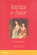 Capa da tradução para o português da peça Intriga e Amor de Schiler.